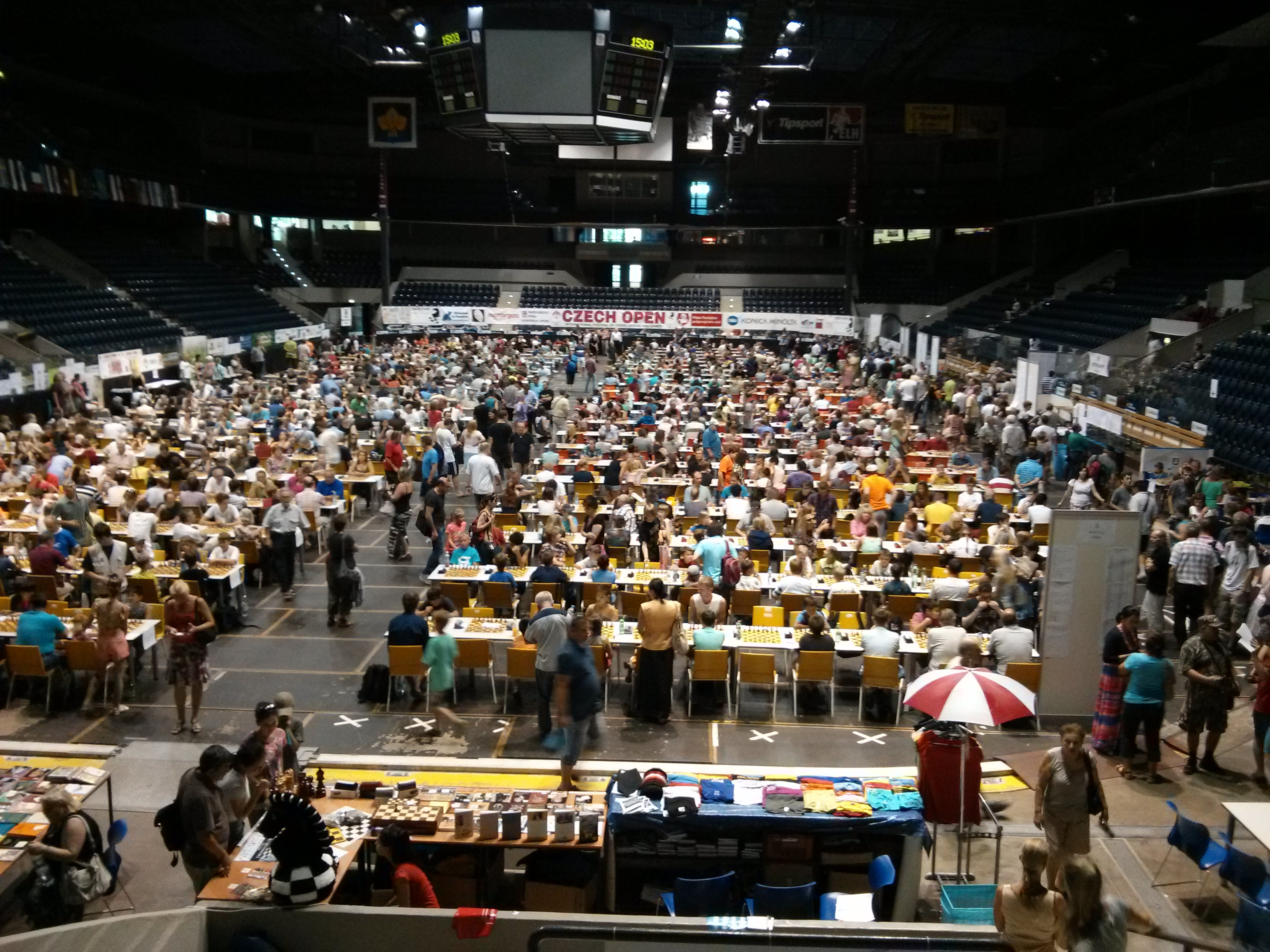 Schachturnier in Pardubice